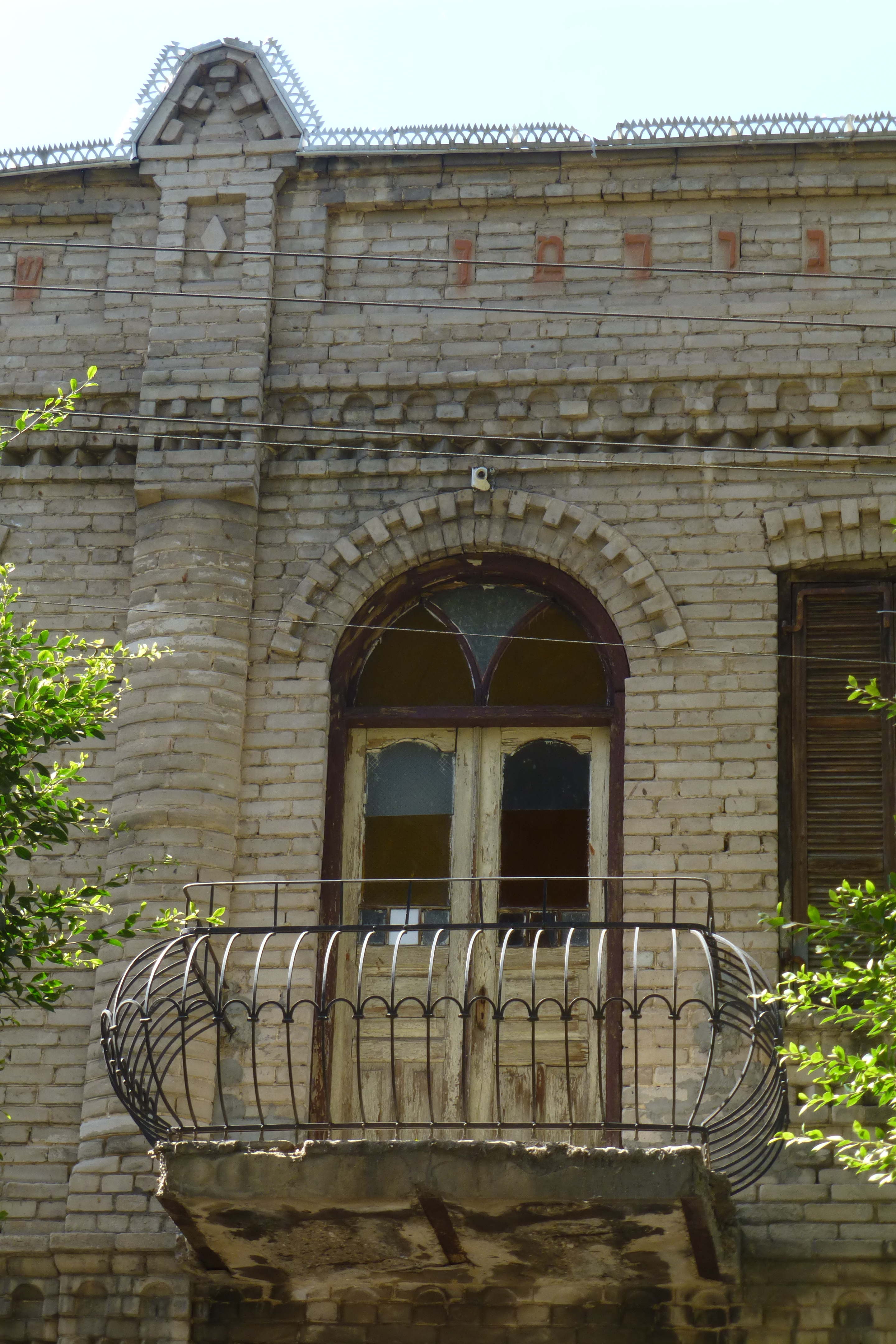 הבית, על חלקה של גודמן, נבנה בדגם בתים דומים בפולין על ידי מרדכי רוטברד ובניו.